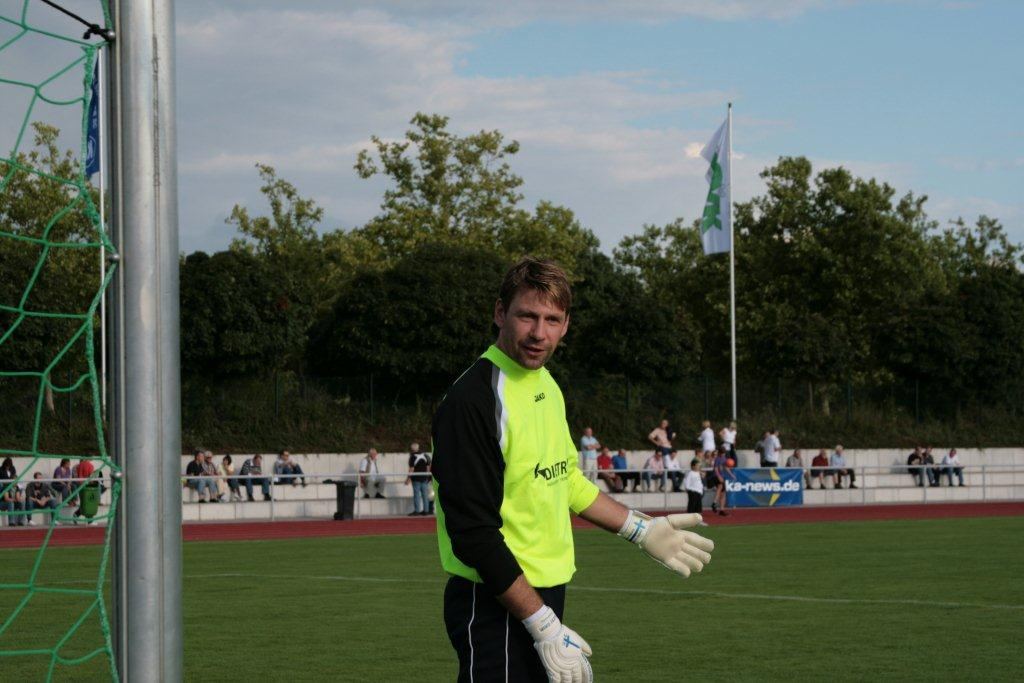 Martin Fischer (Fußballspieler) at the benefit match KSC Altstars versus Eintracht Frankfurt Altstars on July, 30th 2010 in Karlsruhe